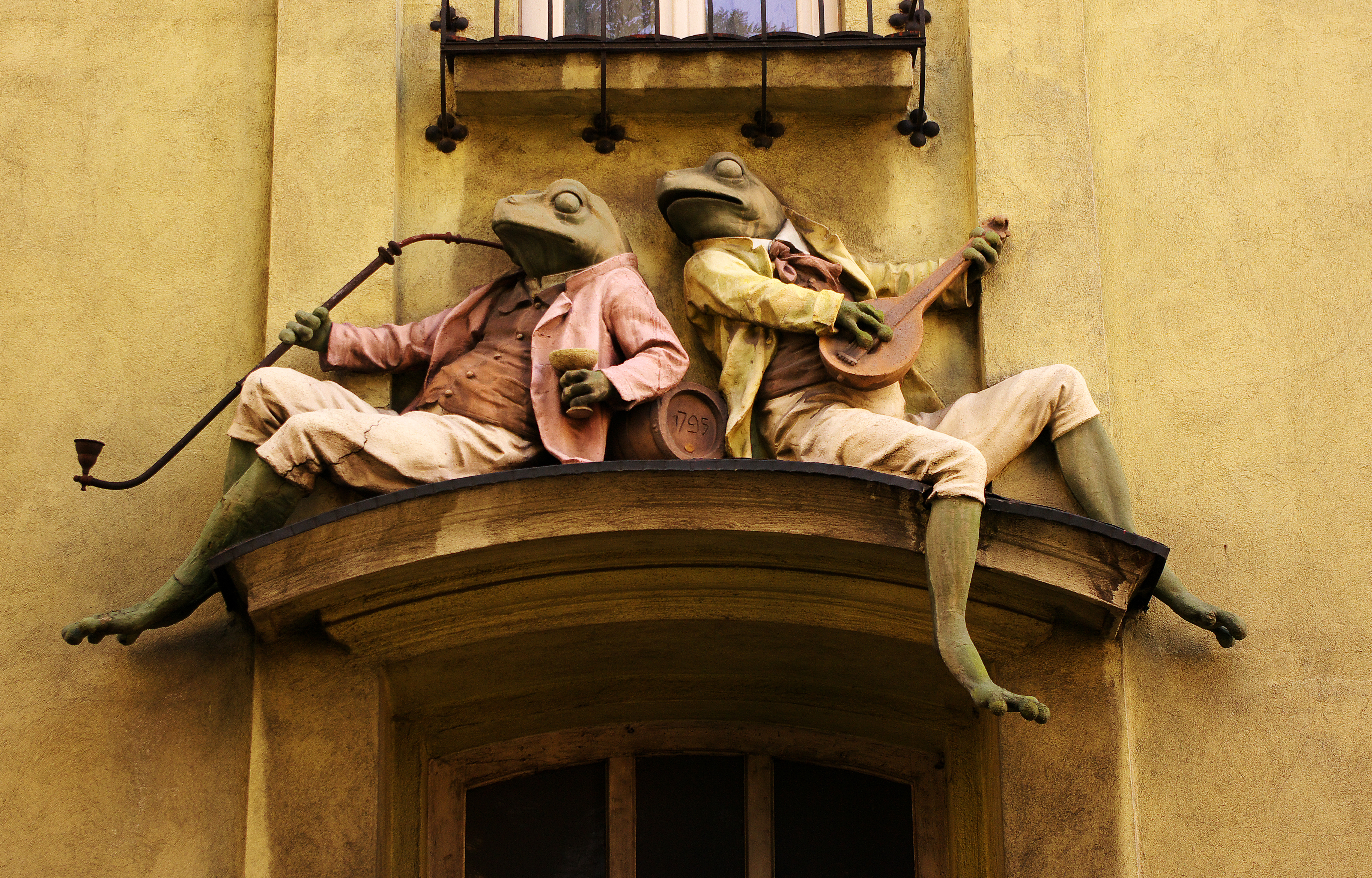 Secesyjna "Kamienica Pod Żabami" - portal